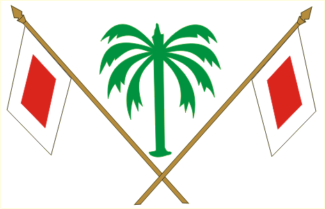 coa Sharjah